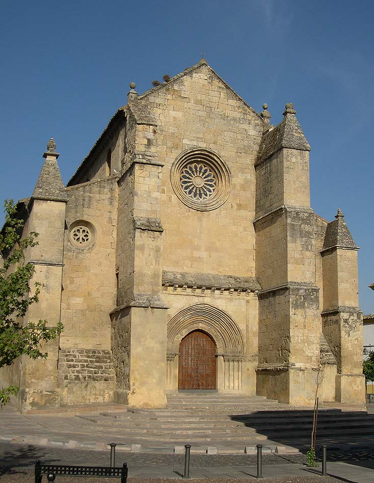 Iglesia de Santa Marina, en Córdoba (España).